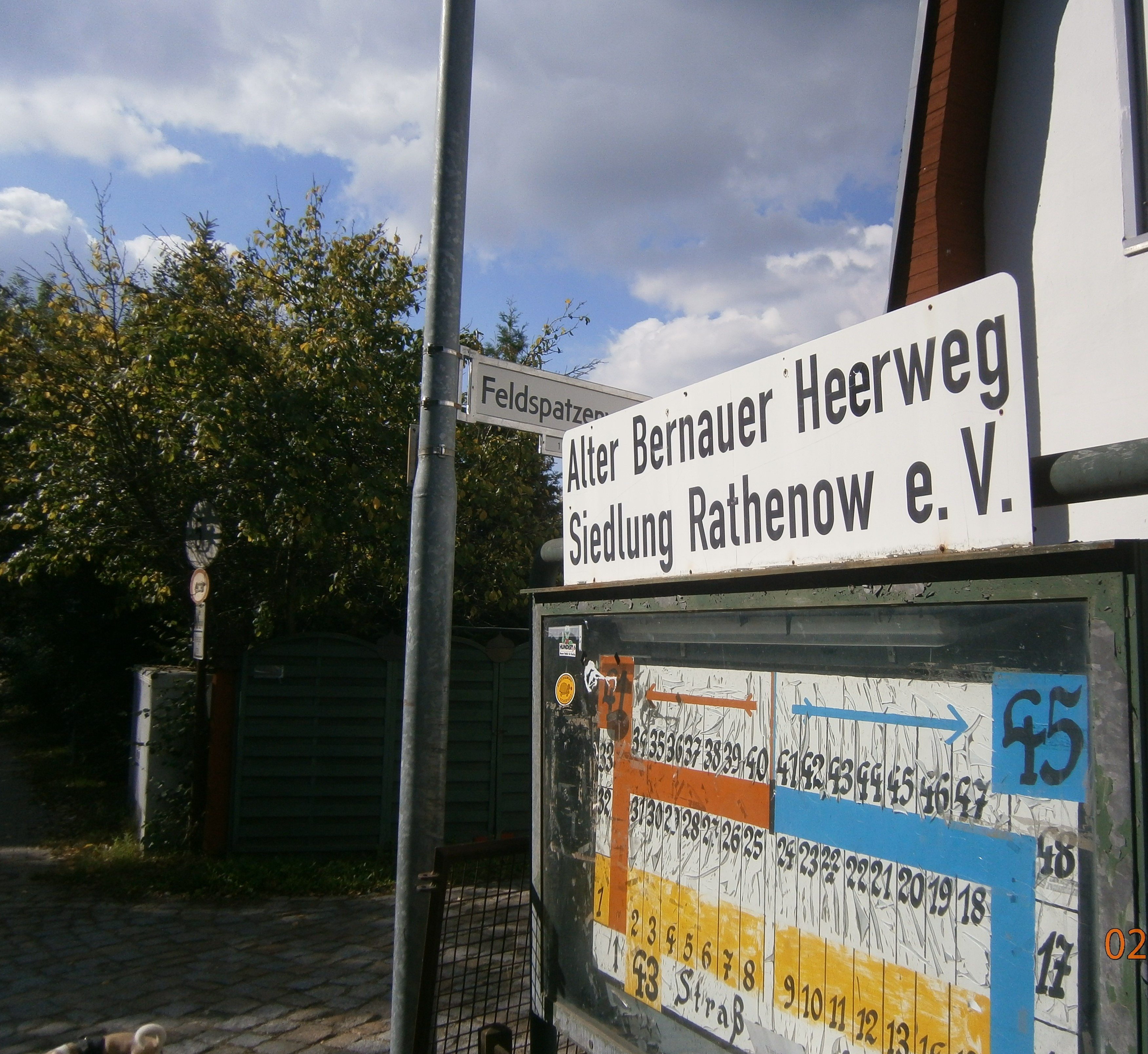 Der Feldspatzenweg ist eine Straße in Berlin-Lübars. Sie liegt in der Siedlung Rathenow. Hier der Blick am westlichen Weg der U-förmigen Straße, nordwärts vom Alten Bernauer Heerweg.